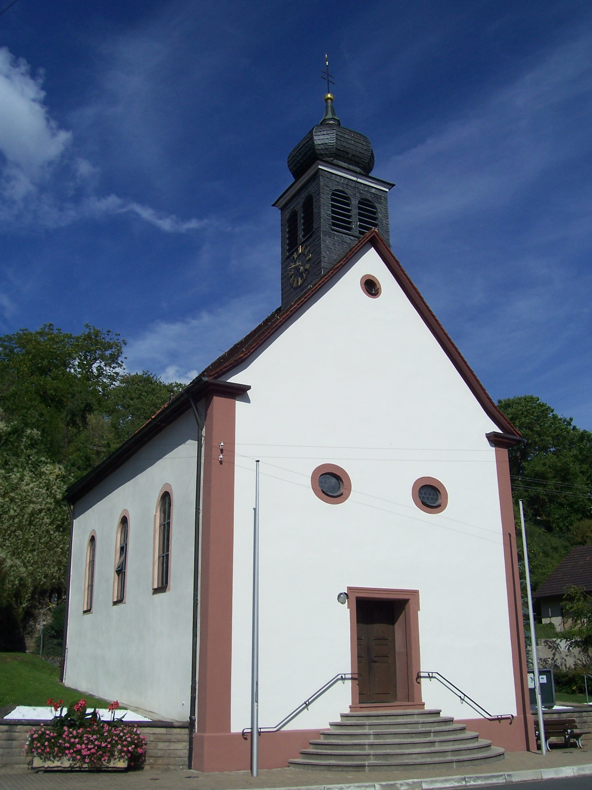 St. Jakobus in Dienstadt (Tauberbishofsheim). Die Grundmauern des Chores stammen aus dem 14. Jahrhundert, das Kirchenschiff wurde 1783 gebaut.